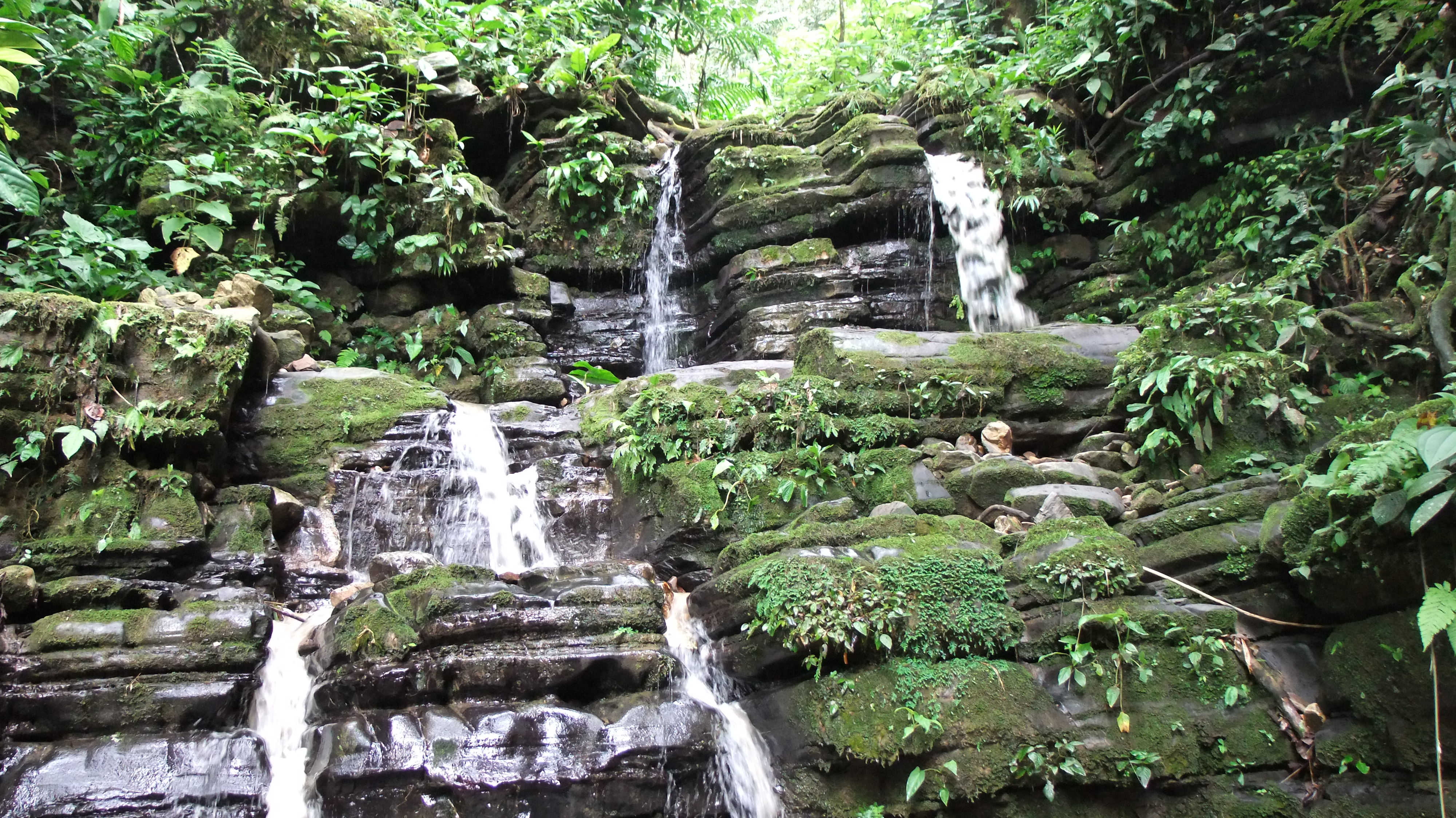 Cascadas del valle misterioso, Huambi, Sucua, Ecuador